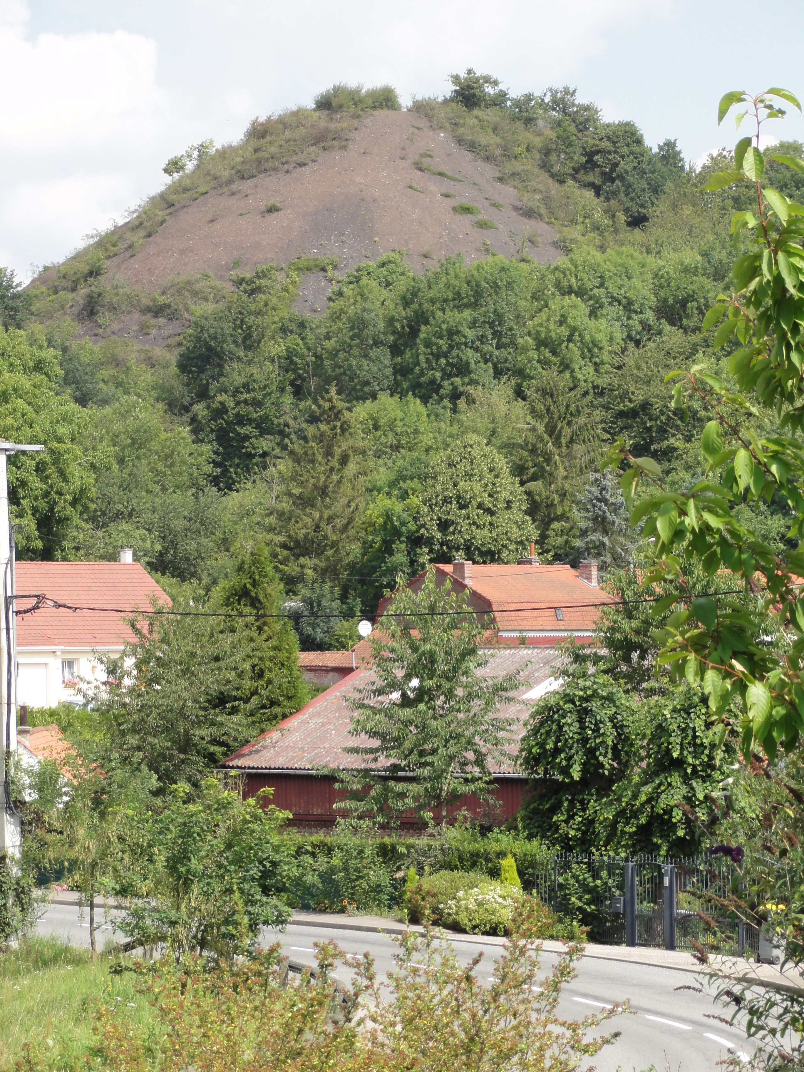 Terril n° 244 dit Fléchinelle Ouest, fosse n° 1 - 1 bis de la Compagnie des mines de Ligny-lès-Aire dans le bassin minier du Nord-Pas-de-Calais, Enquin-les-Mines, Pas-de-Calais, Nord-Pas-de-Calais, France. Le terril no 244 est inscrit sur la liste du patrimoine mondial de l'Unesco le 30 juin 2012 et y constitue le site no 109.